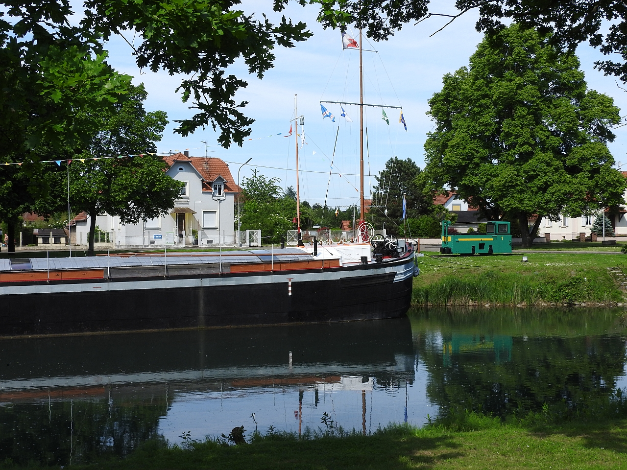 Offendorf, 26.05.2016